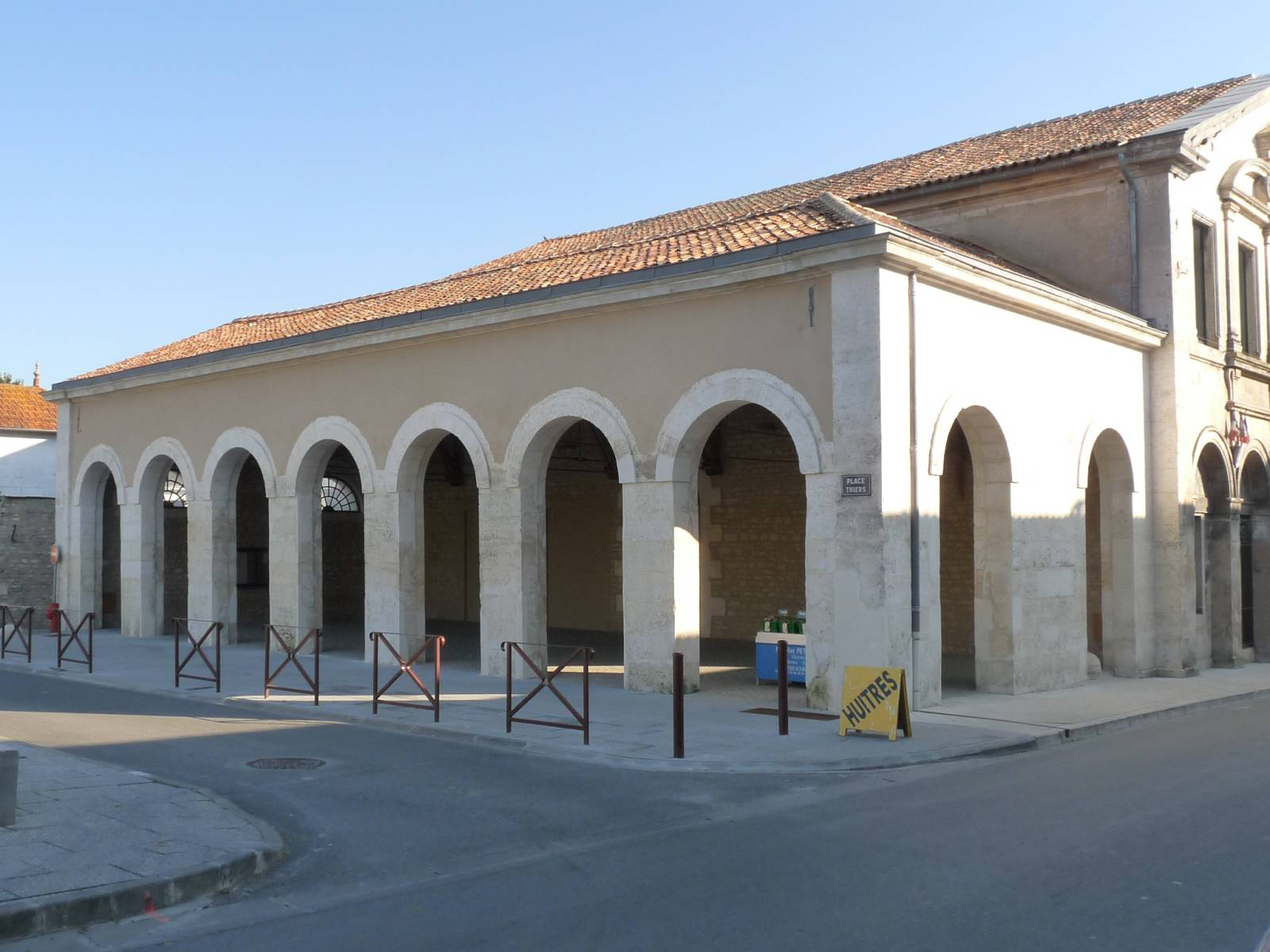 Place Thiers, halle de Rouillac, Charente, France